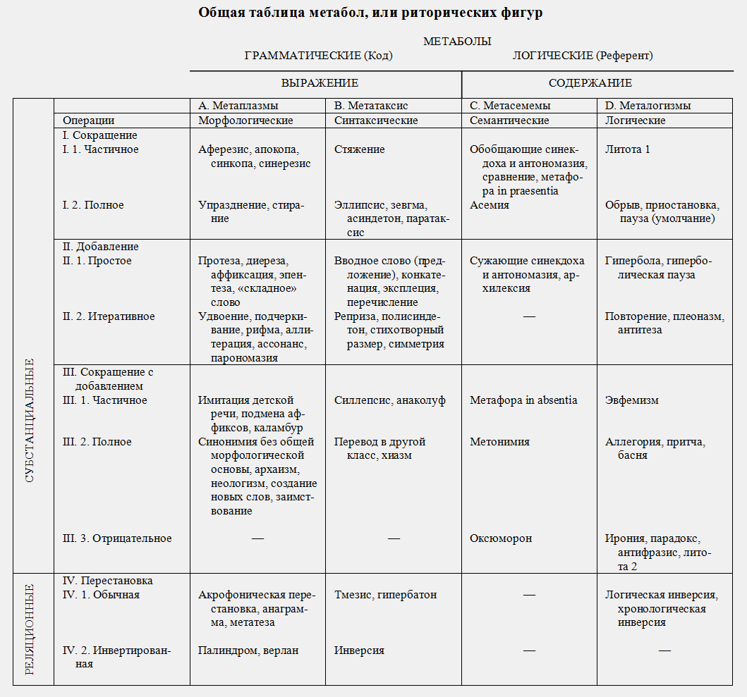 Фигуры речи: классификация Группы Мю (из книги "Общая риторика", рус. пер. 1986)